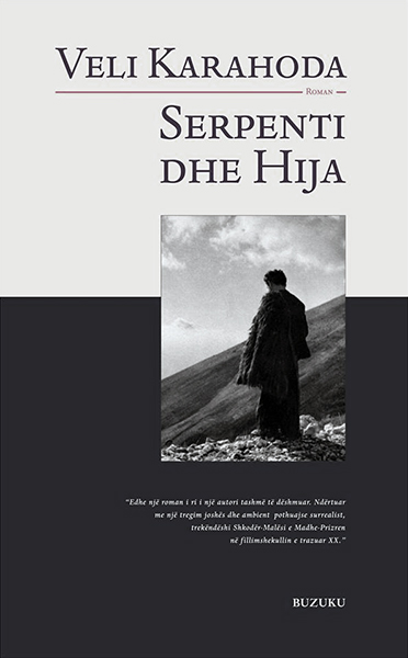 Serpenti dhe Hija, kopertina, Botimet Buzuku